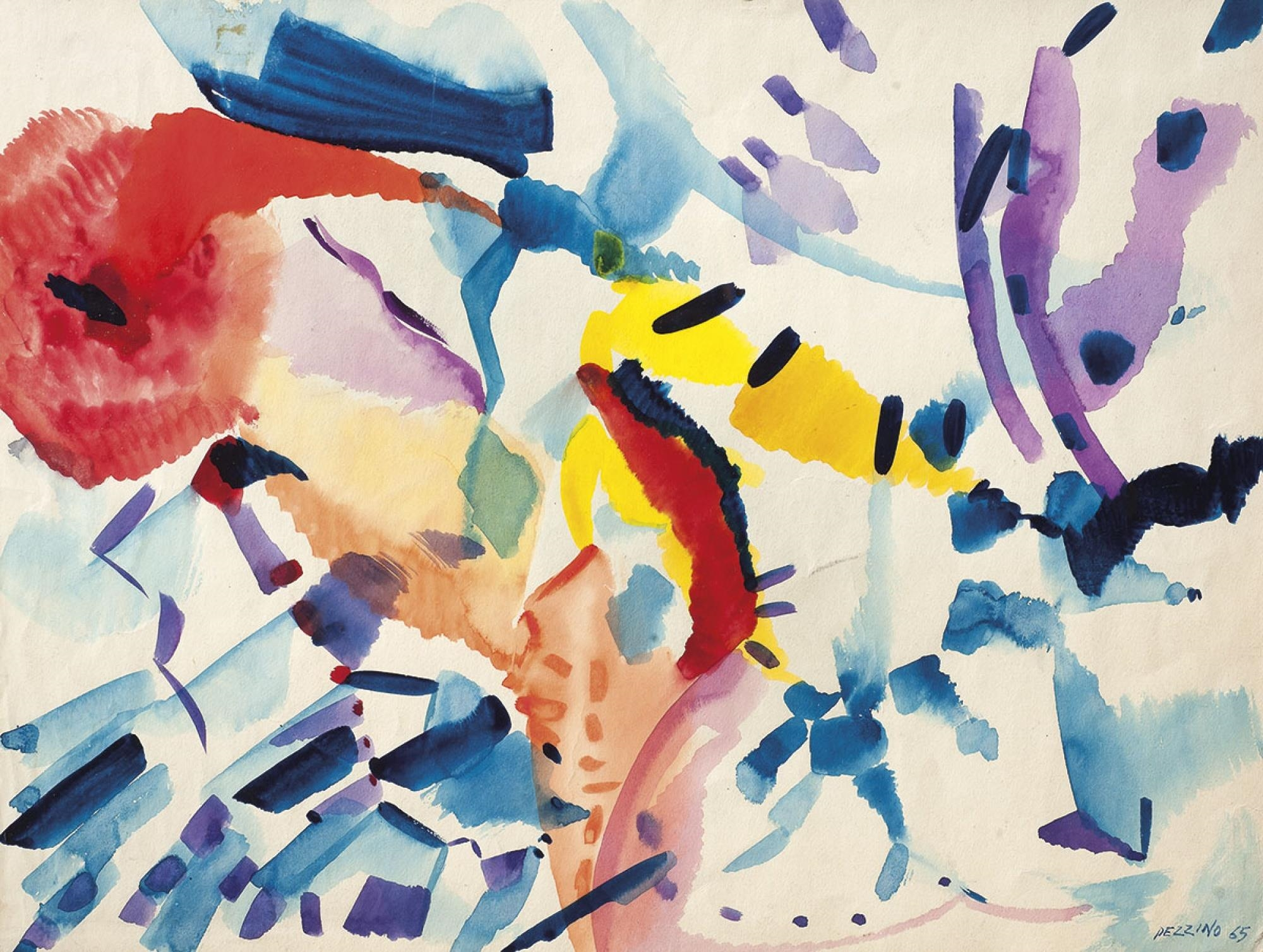 Pintura de Antonio Pezzino fechada en 1965